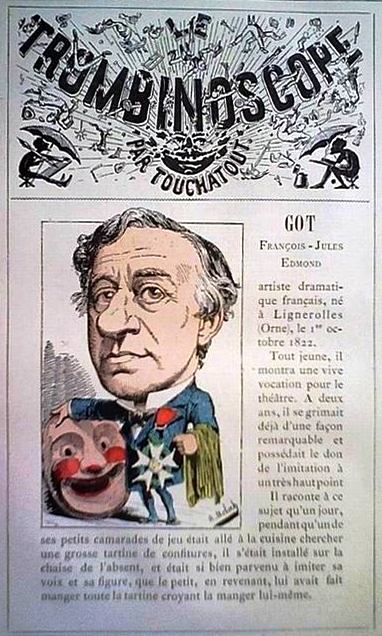 Portrait satirique d' Francisque Sarcey. N°22 Le Trombinoscope